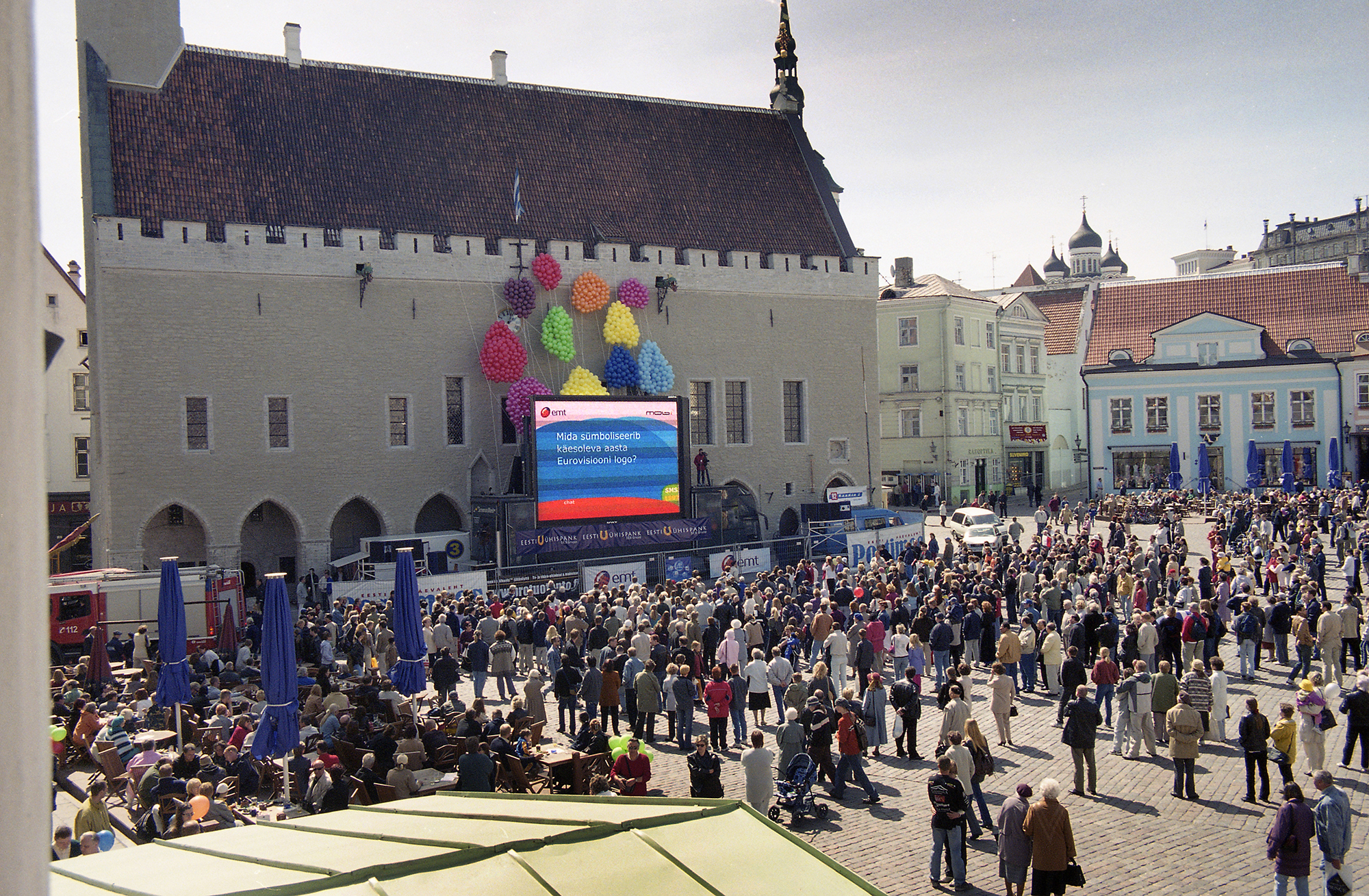 Eurovisiooni 2002 Raekoja platsil (16)